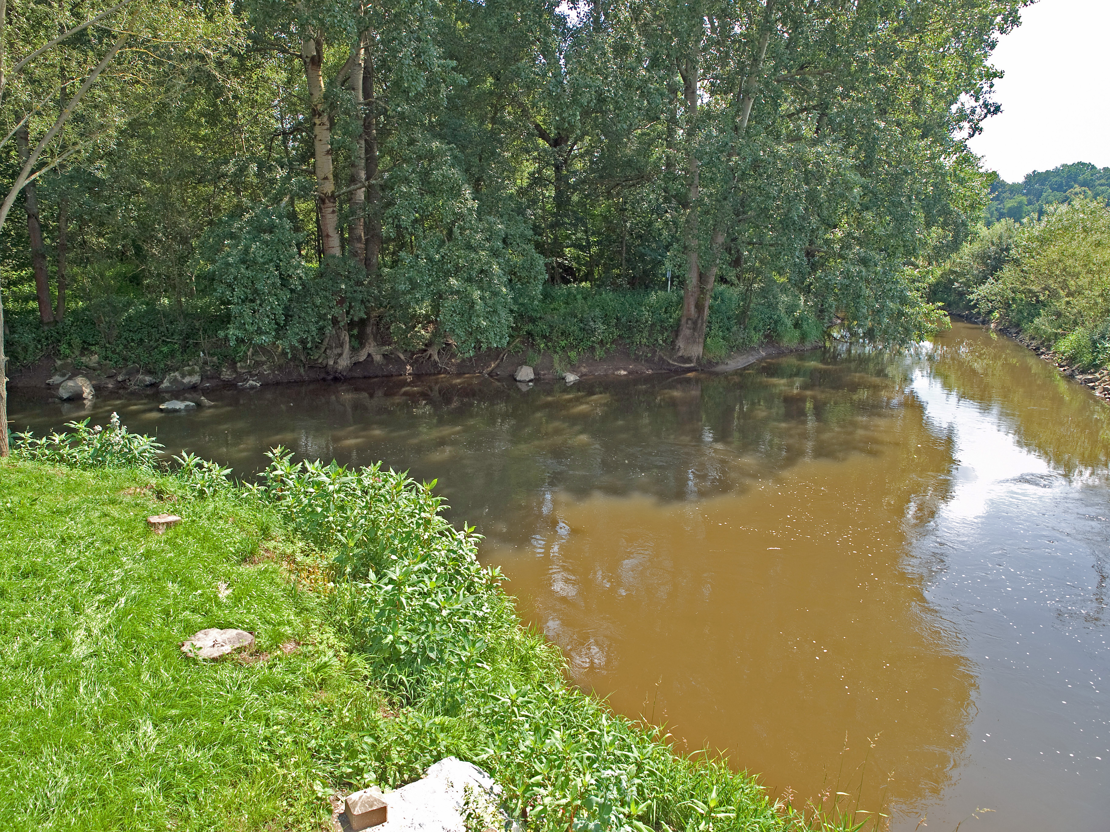 Main: Vereinigung von Roter Main (rechts) und Weißer Main (links), nahe Kulmbach